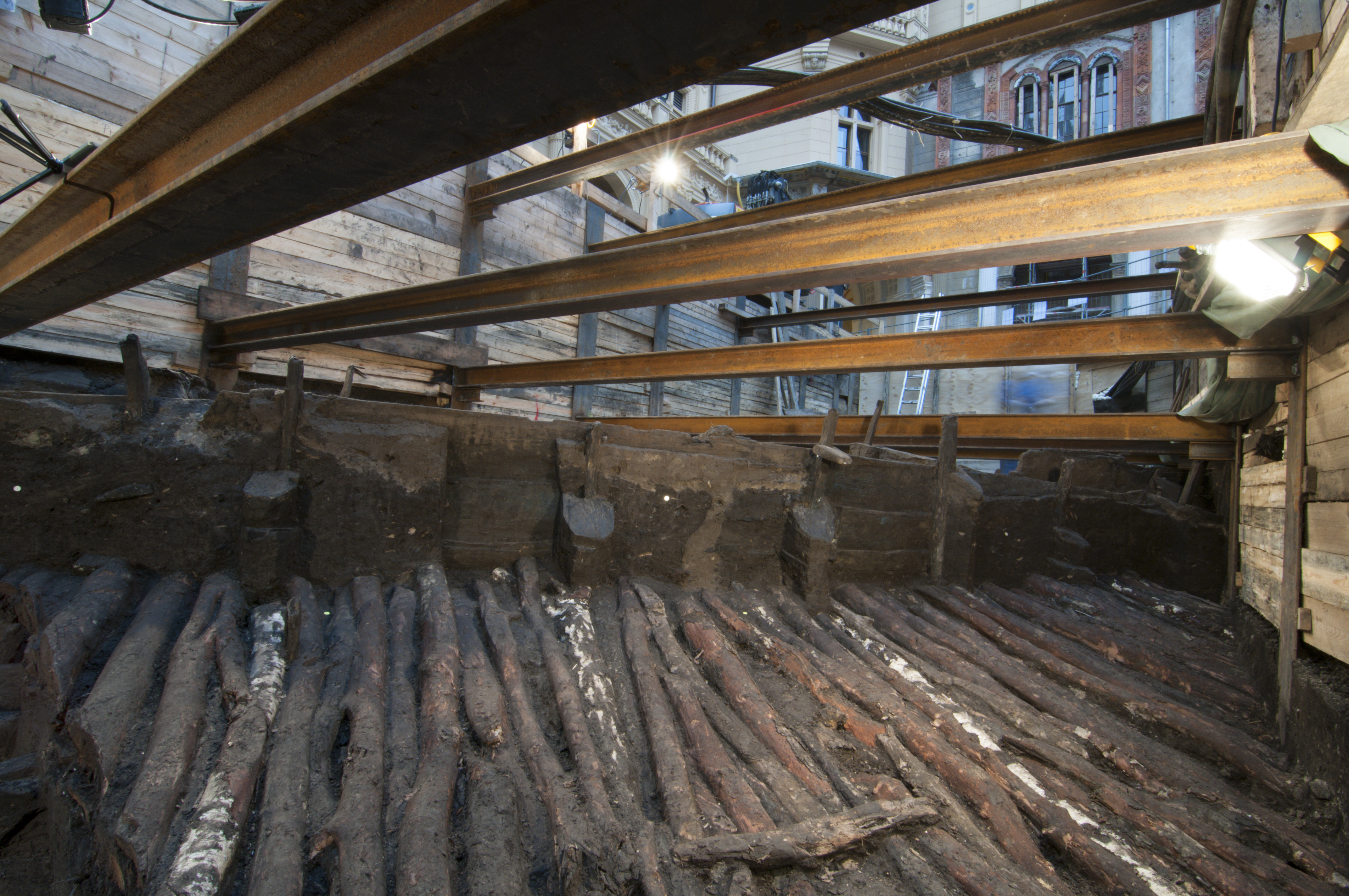 Ausgrabungen Slawischer Burgwall im Schweriner Schloß 2014 Ausgrabungen Slawenwall Schweriner SchloßBei Bauarbeiten im Schweriner Schloß stieß man im Herbst 2014 unerwartet auf eine gut erhaltene bauliche Anlage der Slawen, die durch Dendrochronologie um das Jahr 965 datiert werden kann. Die archäologischen Grabungen legten einen Burgwall frei, der in Ausmaß und Lage nicht hier erwartet wurde. Es sind außerdem die ältesten Zeugnisse menschlicher Besiedlung in der Landeshauptstadt Schwerin. The making of this document was supported by the Community-Budget of Wikimedia Germany.